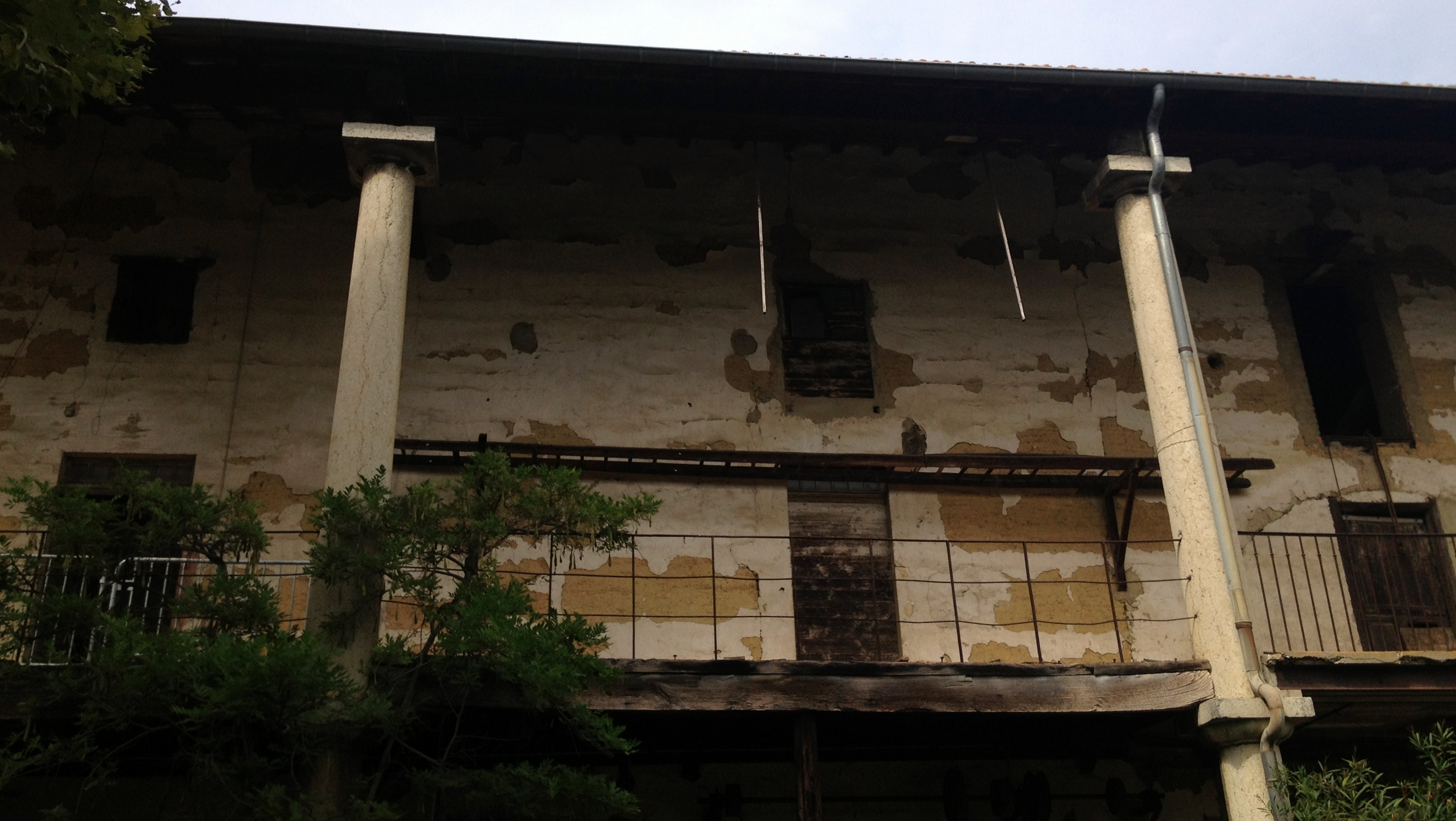 Maison Delorme à Beynost : journées du patrimoine 2013.